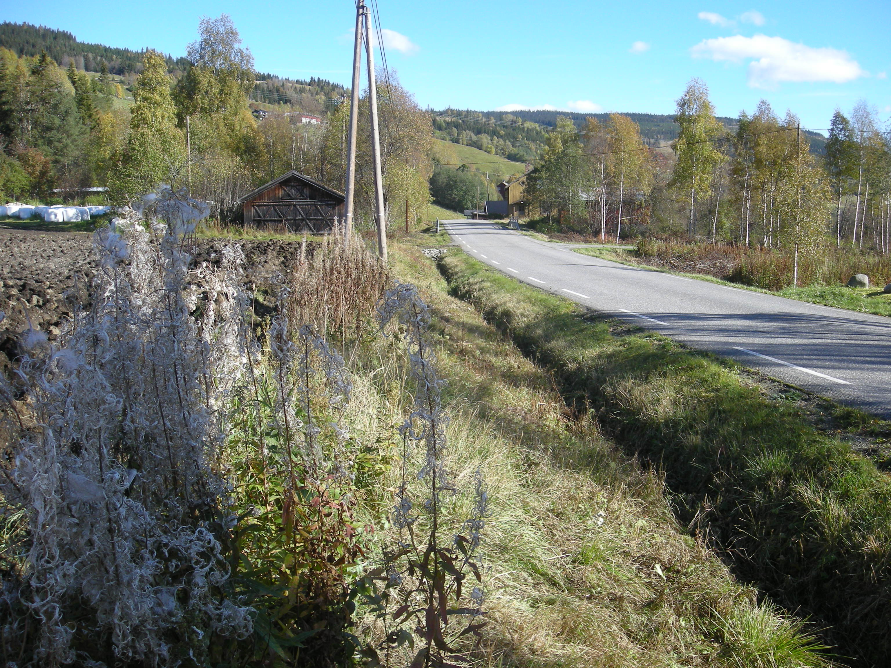 Fylkesvei 255 (tidligere riksvei 255) ved Svatsum kirke i Gausdal